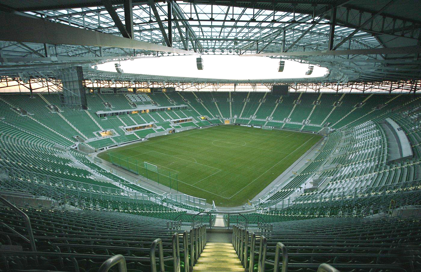 Trybuny i murawa - panorama wnętrza.